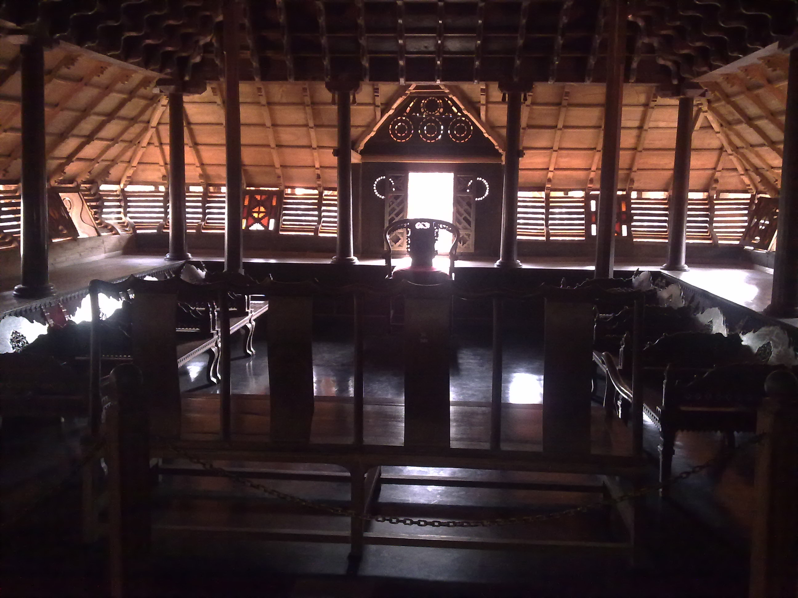 പത്മനാഭപുരം കൊട്ടാരത്തിലെ മന്ത്രശാല